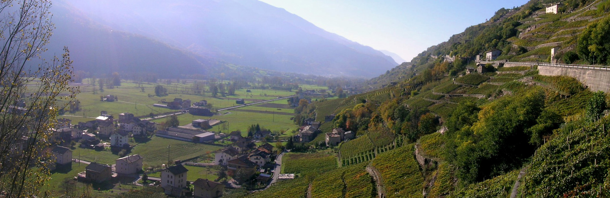 Vineyards - Valgella di Teglio (Sondrio)